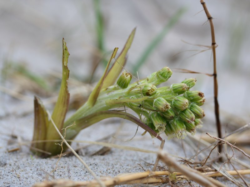 Filzige Pestwurz (Petasites spurius)